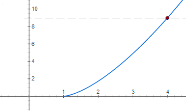 中文（中国大陆）: 半三次曲线的弧长